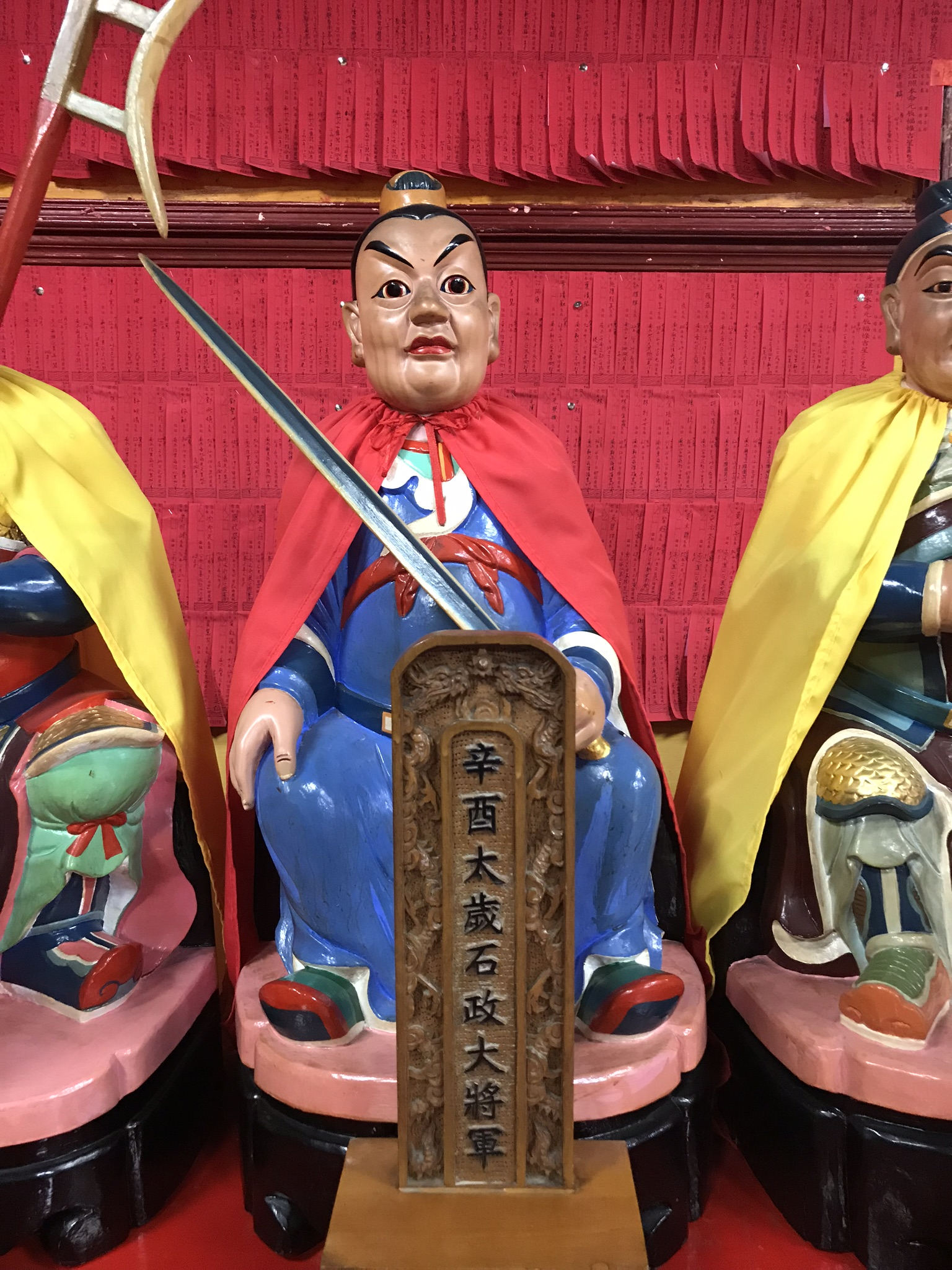 辛酉太歲石政大將軍神像